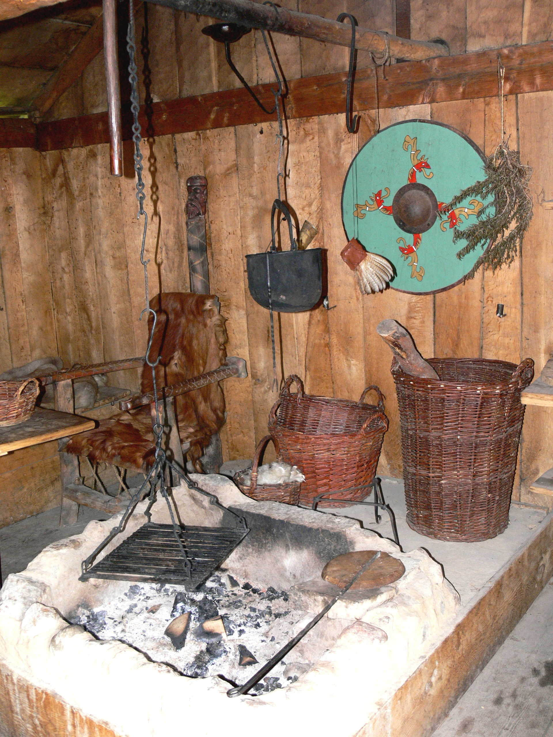 Wikinger Museum Foteviken in Skanör. Feuerstelle mit Schild an der Wand.